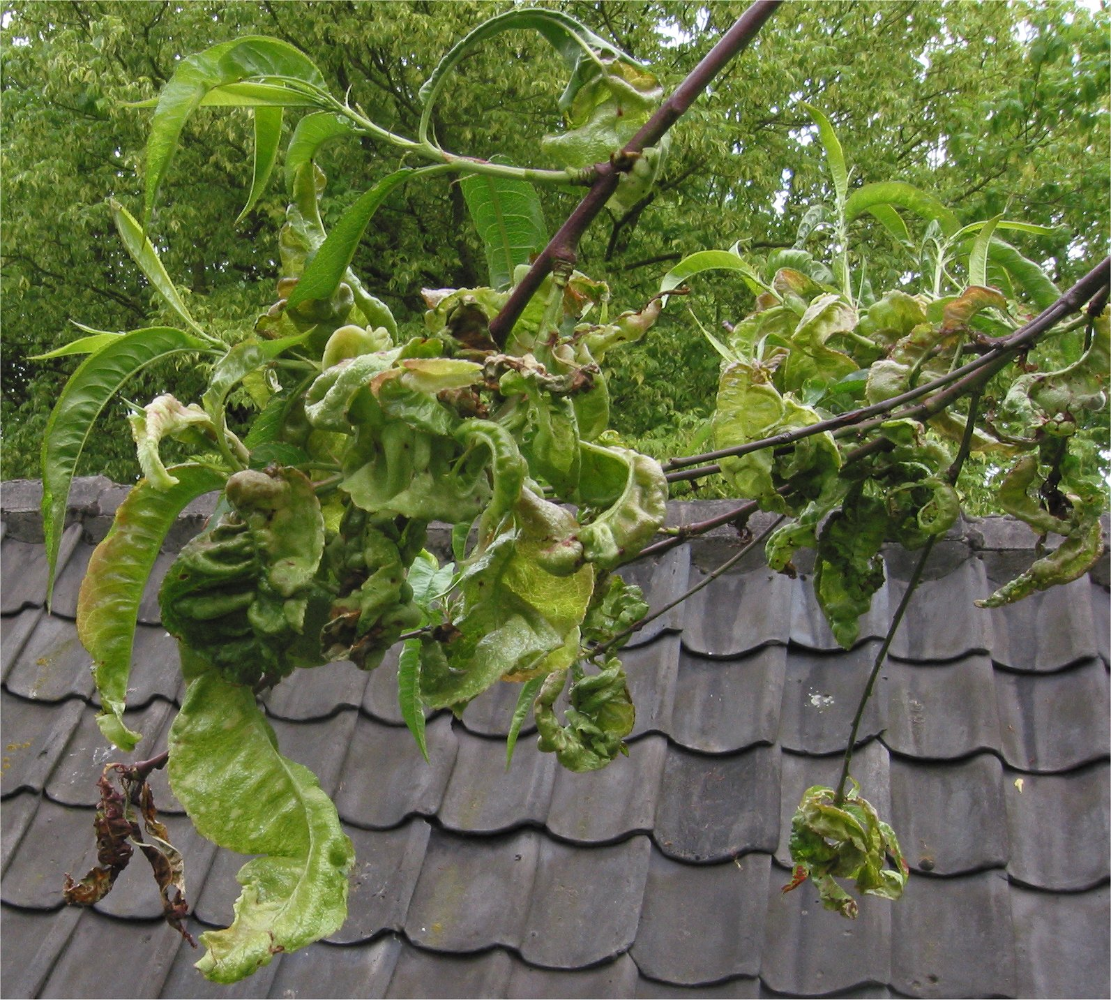 (Krulziekte bij Perzik) Taphrina deformans on Prunus persica